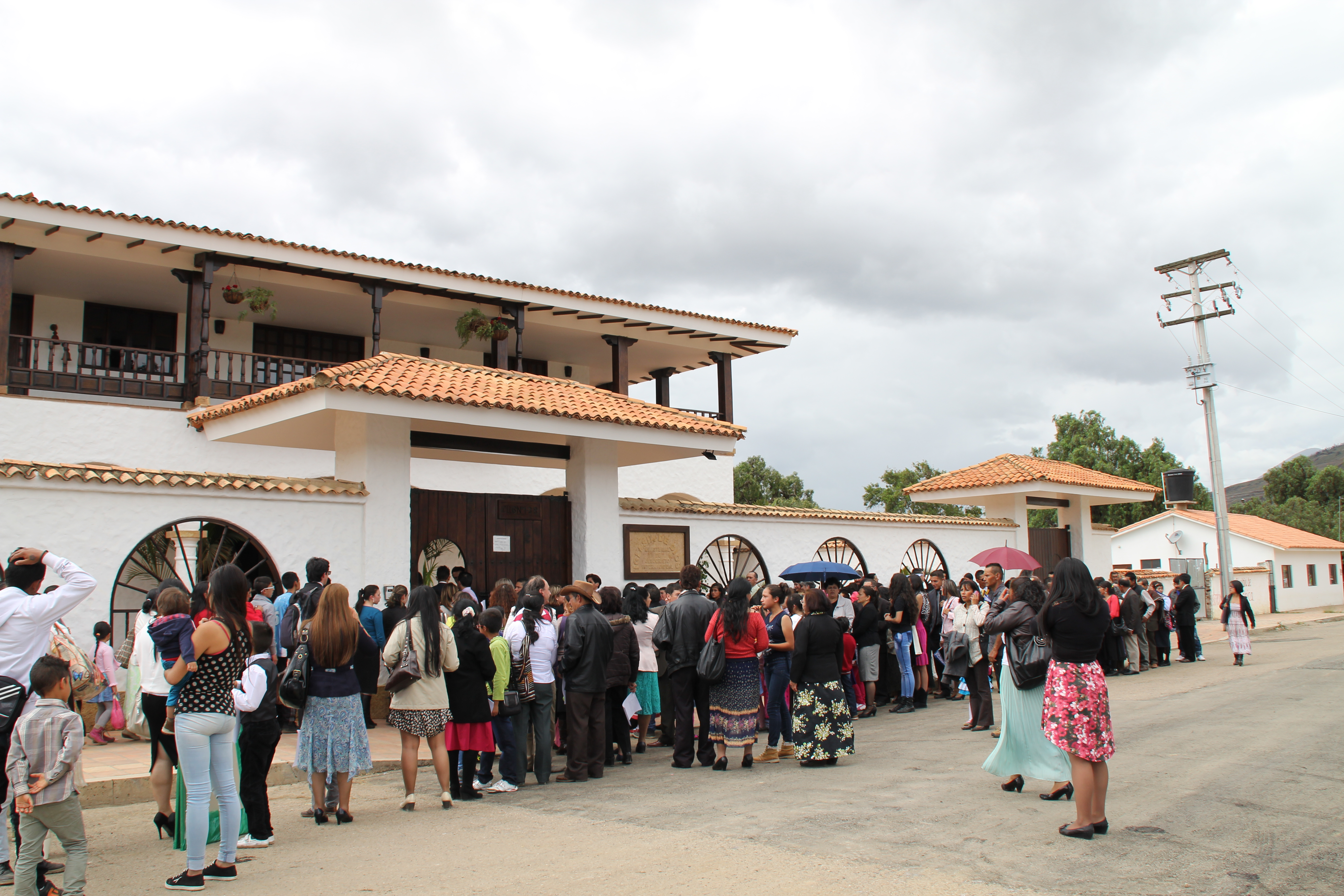 IDMJI - Sáchica - Boyacá - Colombia